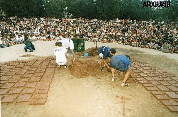 Novè concurs de rajolers al Parc Municipal Torras Villà, realitzat el diumenge de Festa Major, a les set de la tarda. Competició entre els rajolers Amador Galí, de la Colla dels Blancs i Joan Josep Biscarri, de la Colla dels Blaus; guanyada pel rajoler blau. El rajoler blau te l'ajuda de Miquel Locubiche i el blanc del seu fill Jordi Galí Vila i el seu nét Guifré Galí Coll. Pere Cornellas i Aligué 28-08-1994